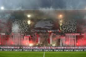 Piacenza Entella 2018/19